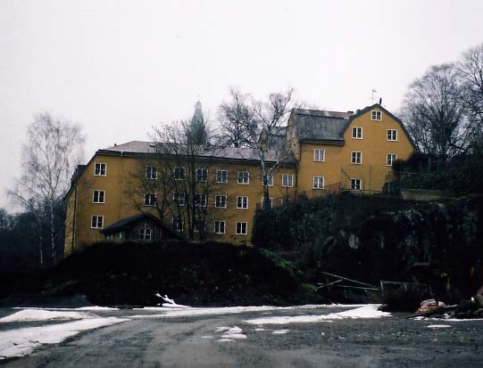 Danviks Dårhus mars 2001.